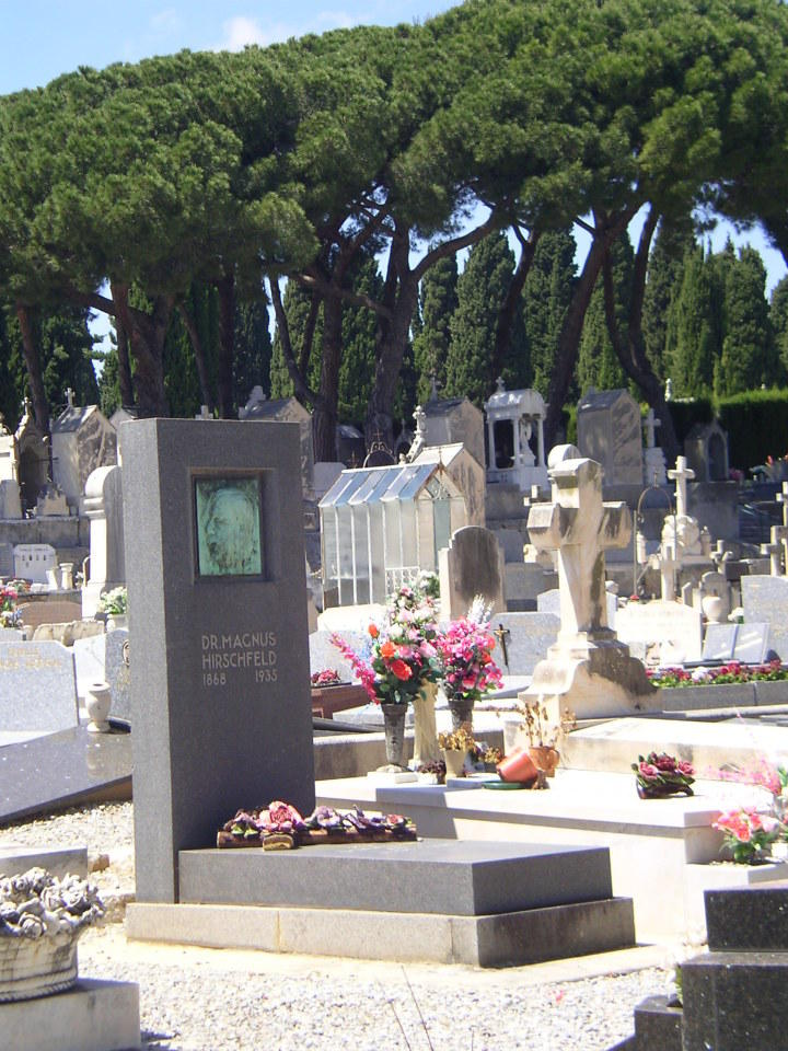 Der Sexualwissenschaftler Magnus Hirschfeld starb in Nizza und wurde hier begraben.